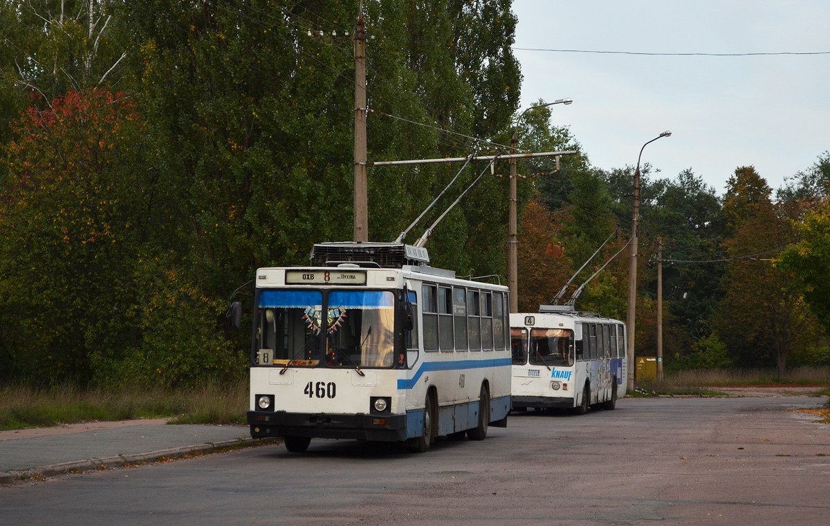 ЮМЗ Т2 №460